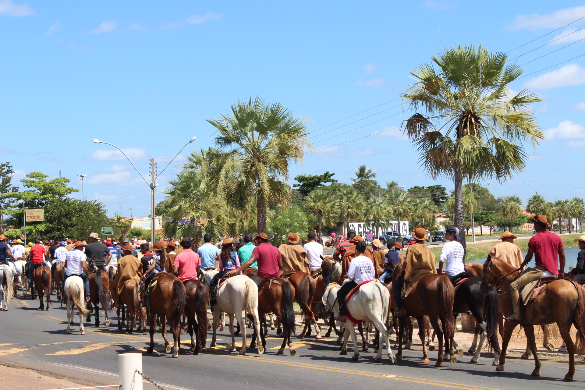 Passeata comemorativa ao dia do vaqueiro no festejo junino de Santo Antonio em Campo Maior, no Piauí.